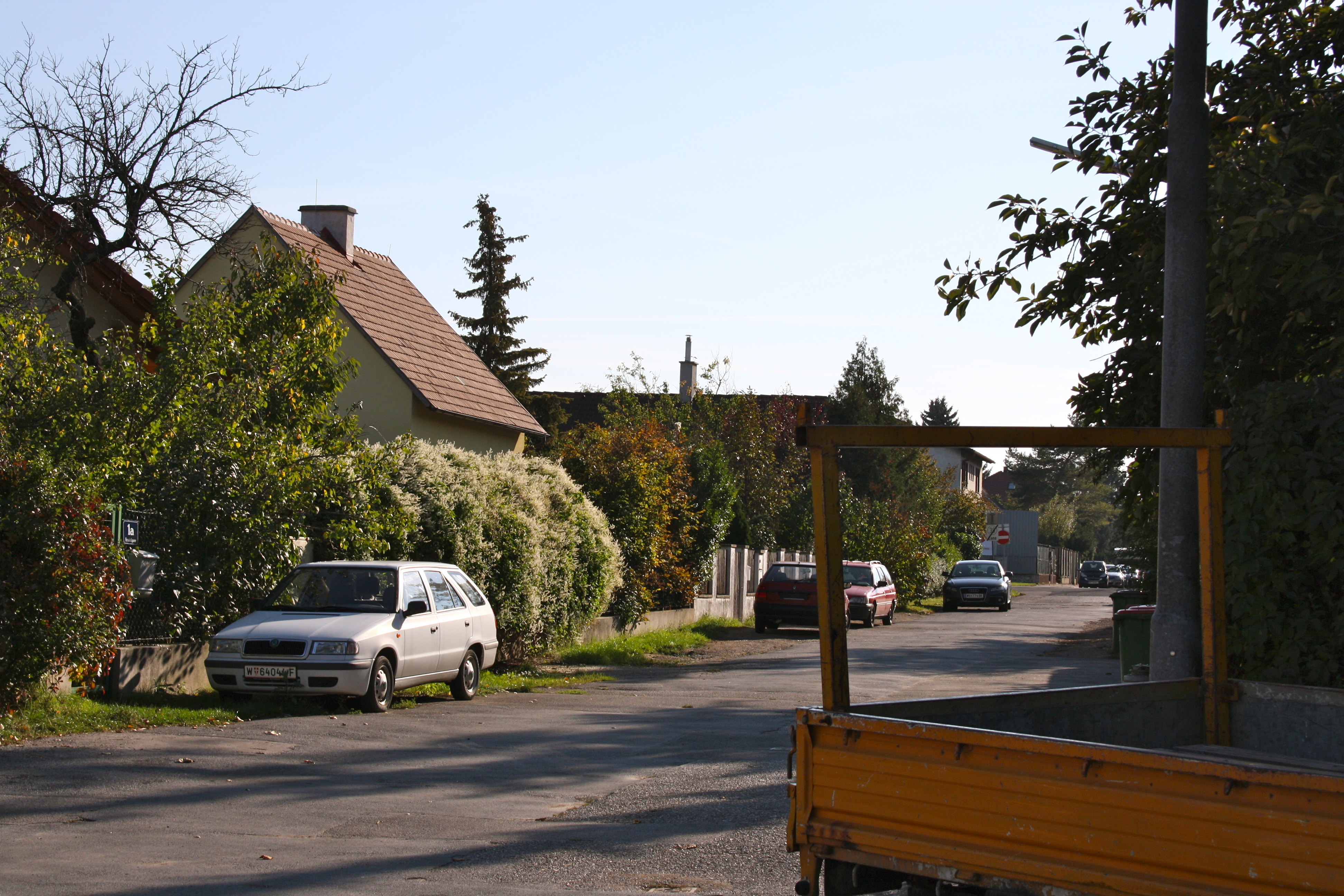 Kronfußgasse, Siedlung Blumental im 23. Wiener Gemeindebezirk Liesing.